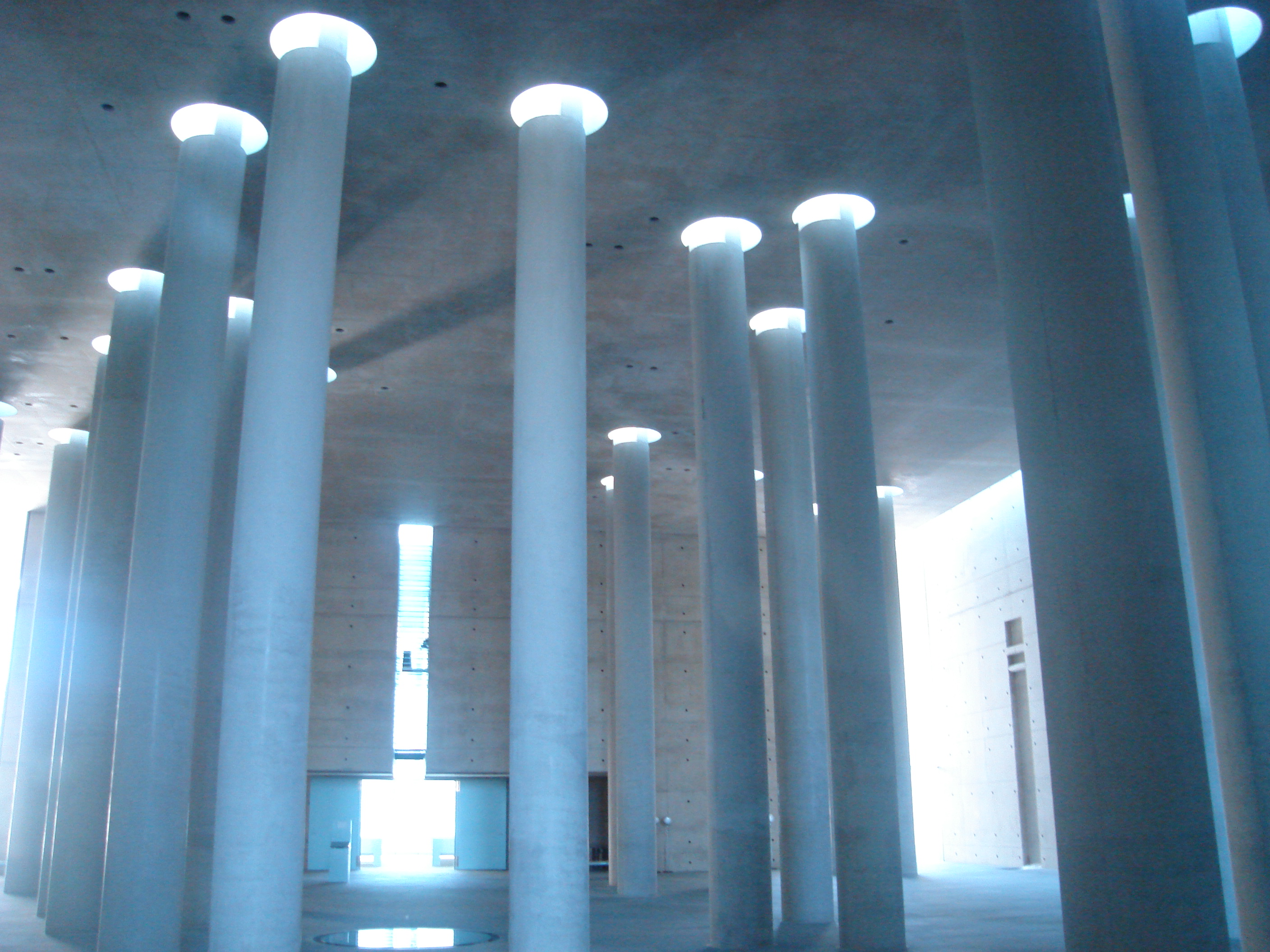 Foyer mit Blick zum sonnendurchfluteten Andachtsraum im Krematorium Baumschulenweg (Berlin-Baumschulenweg), 1996-1998, Architekt Axel Schultes